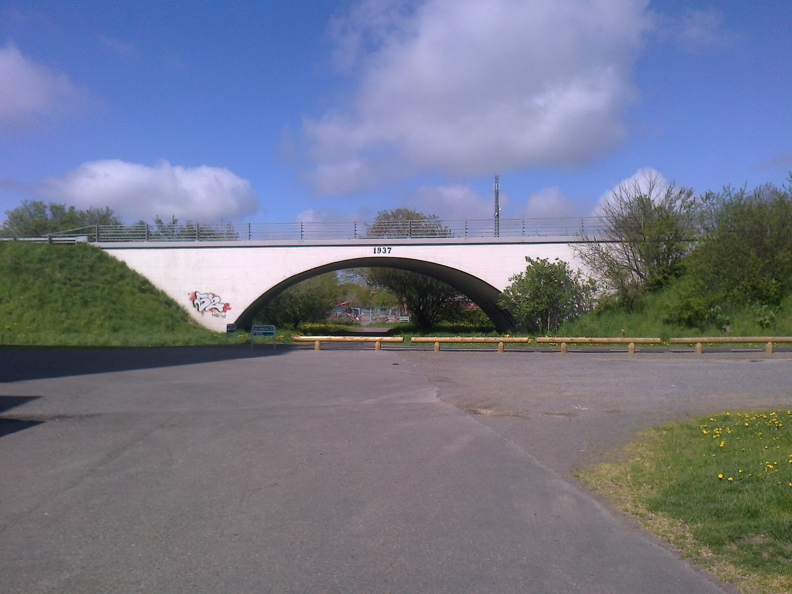 Den asfalterede sti gennem viadukten fra 1937 under Almindingsvej i Aakirkeby. Der var to spor i viadukten, idet både Rønnebanen og Gudhjembanen gik denne vej ud fra stationen.